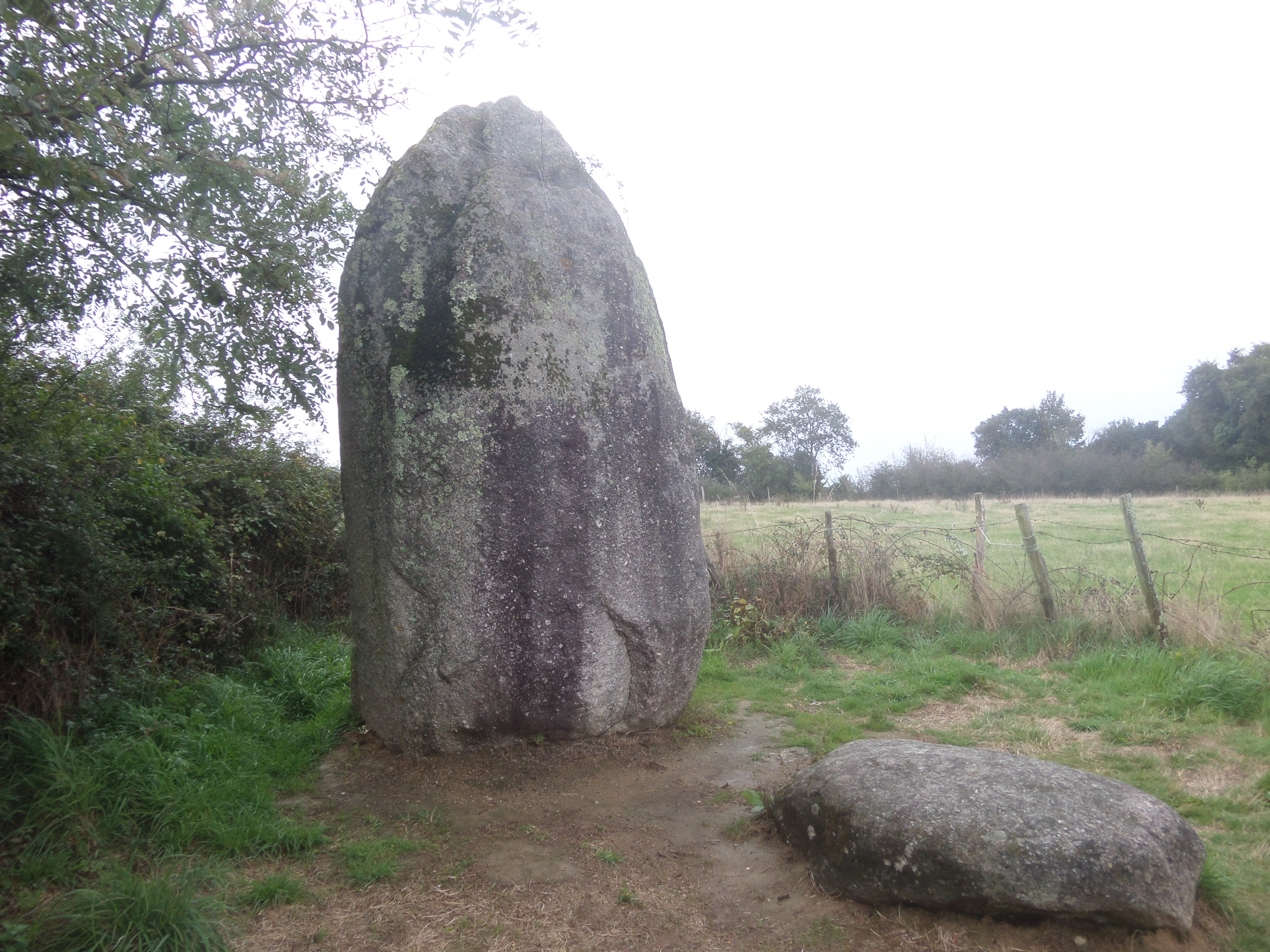 Menhir de la Boitière .